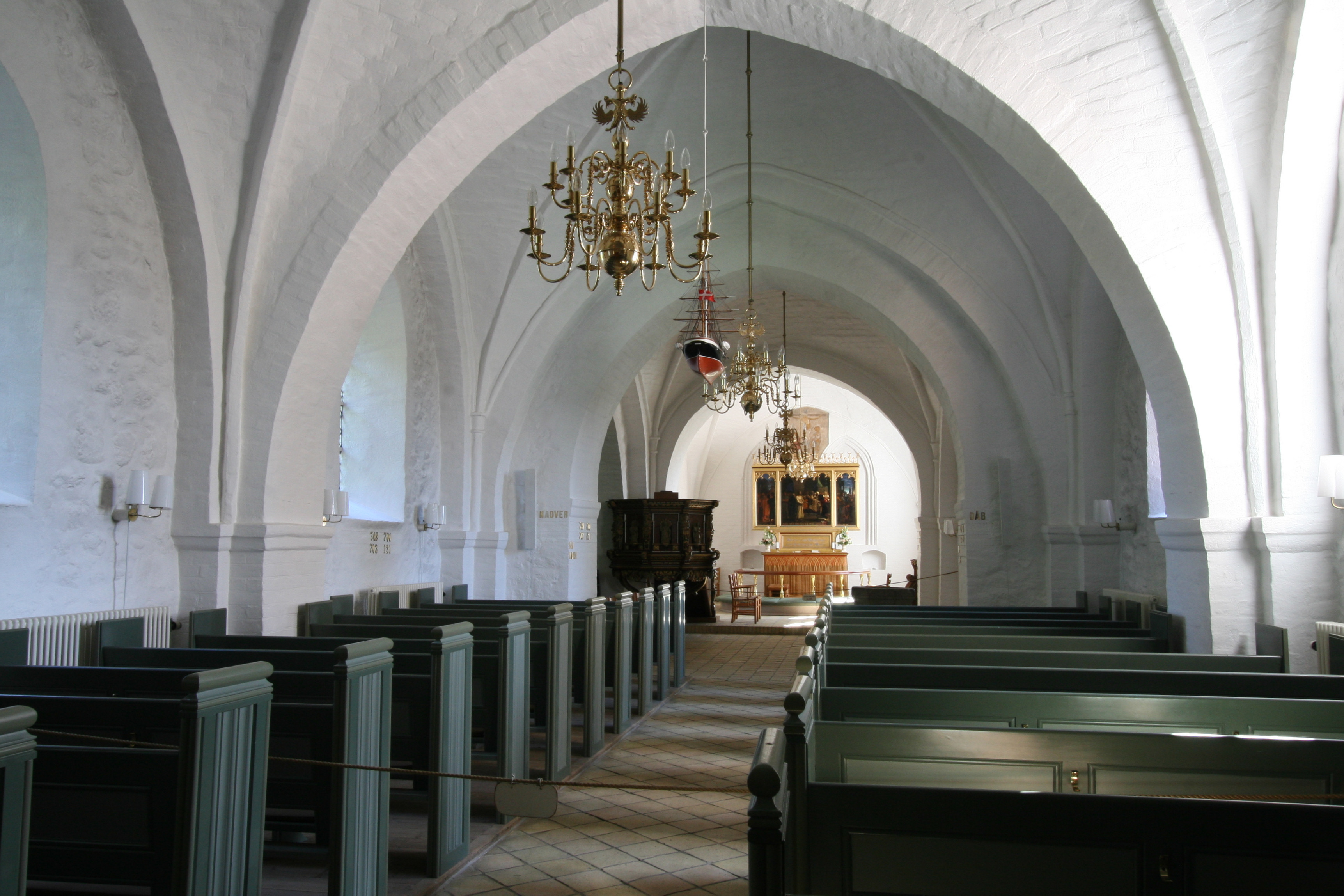 Sankt Peders Kirke in Slagelse, Denmark. Interior